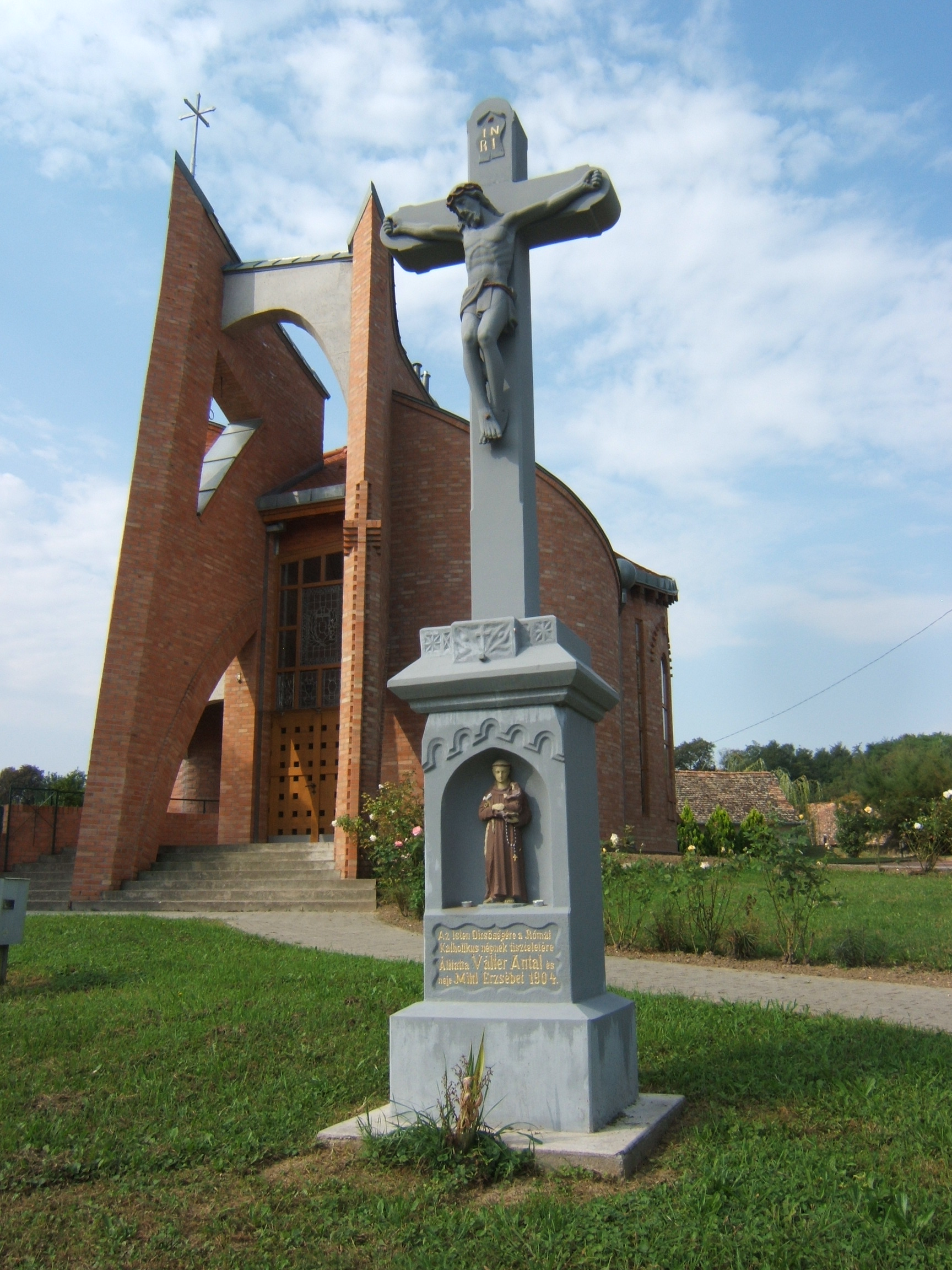 Kékesd, Szent Mihály arkangyal templom, Dévényi Sándor Kossuth-díjas építész, 2009 felszentelve.